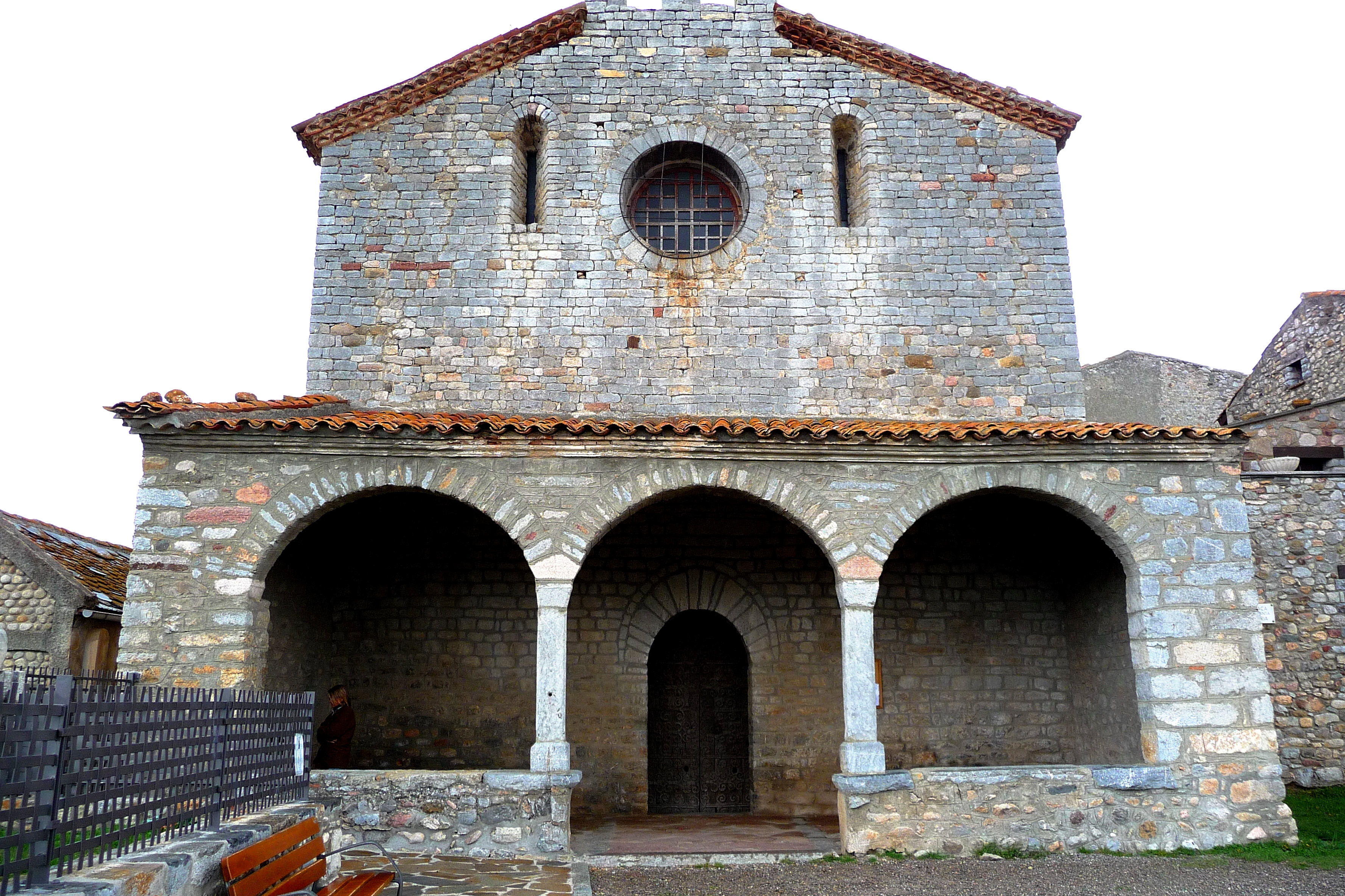 Església Romànica de Talló (Cerdanya).